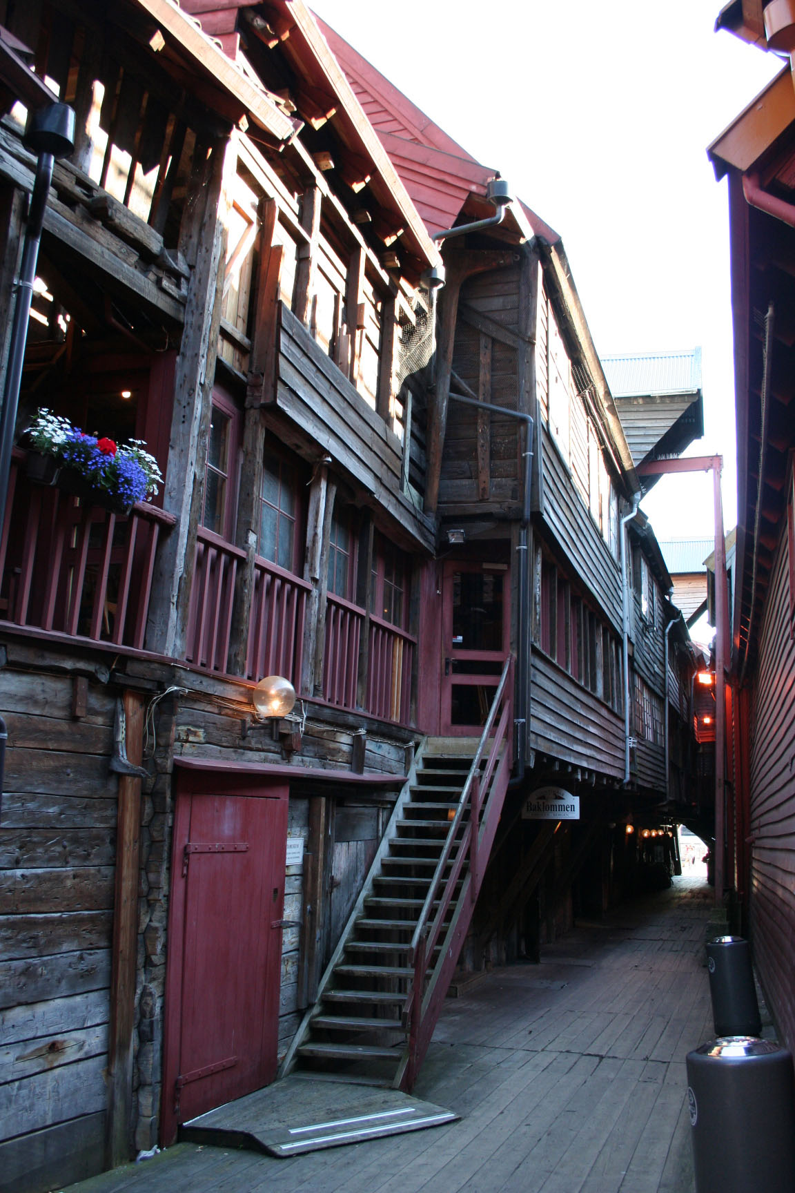 Bergen Bryggen Gang zwischen den Häusern